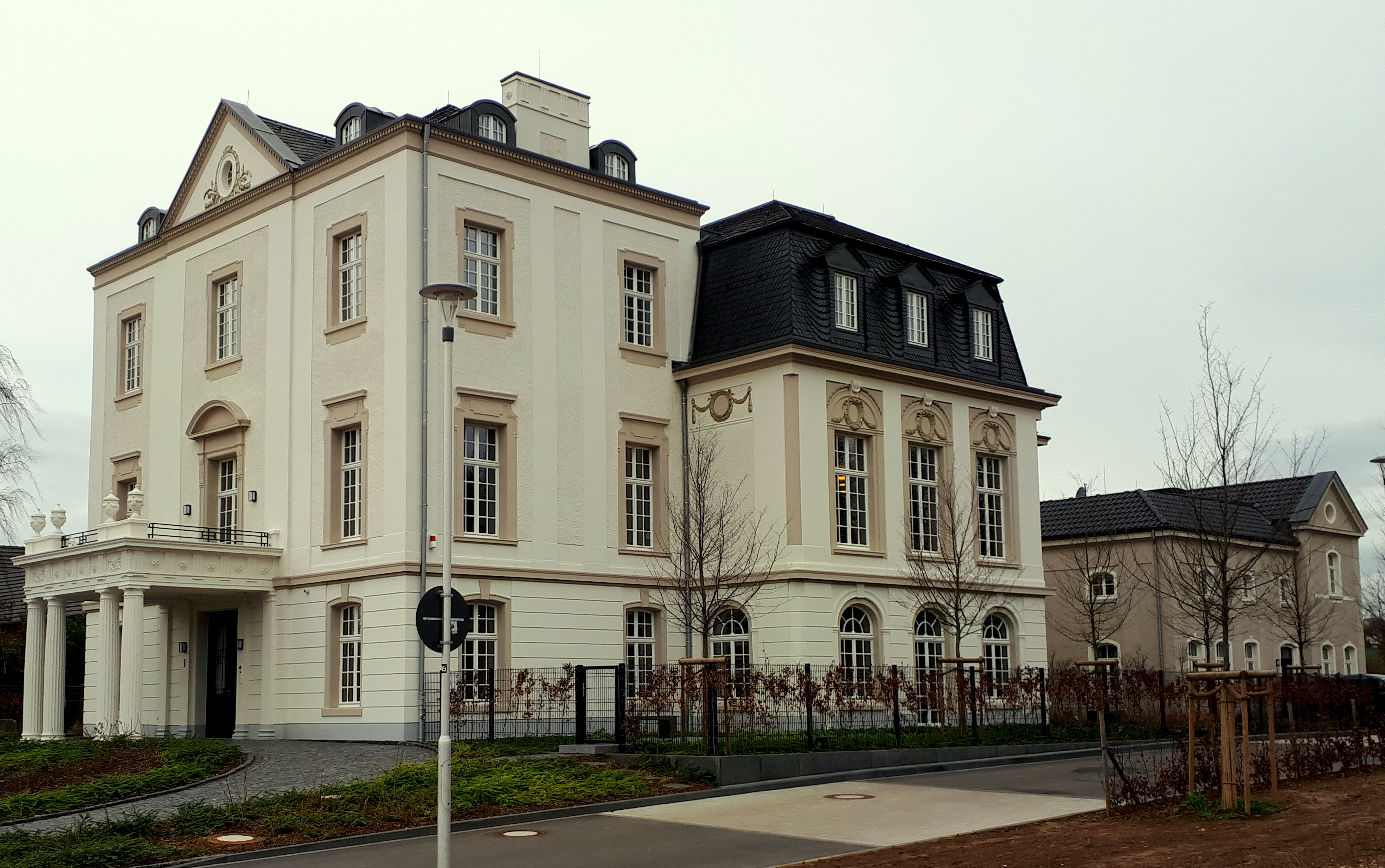 Gut Kaisersruh in Aachen-Würselen nach dem Umbau 2019